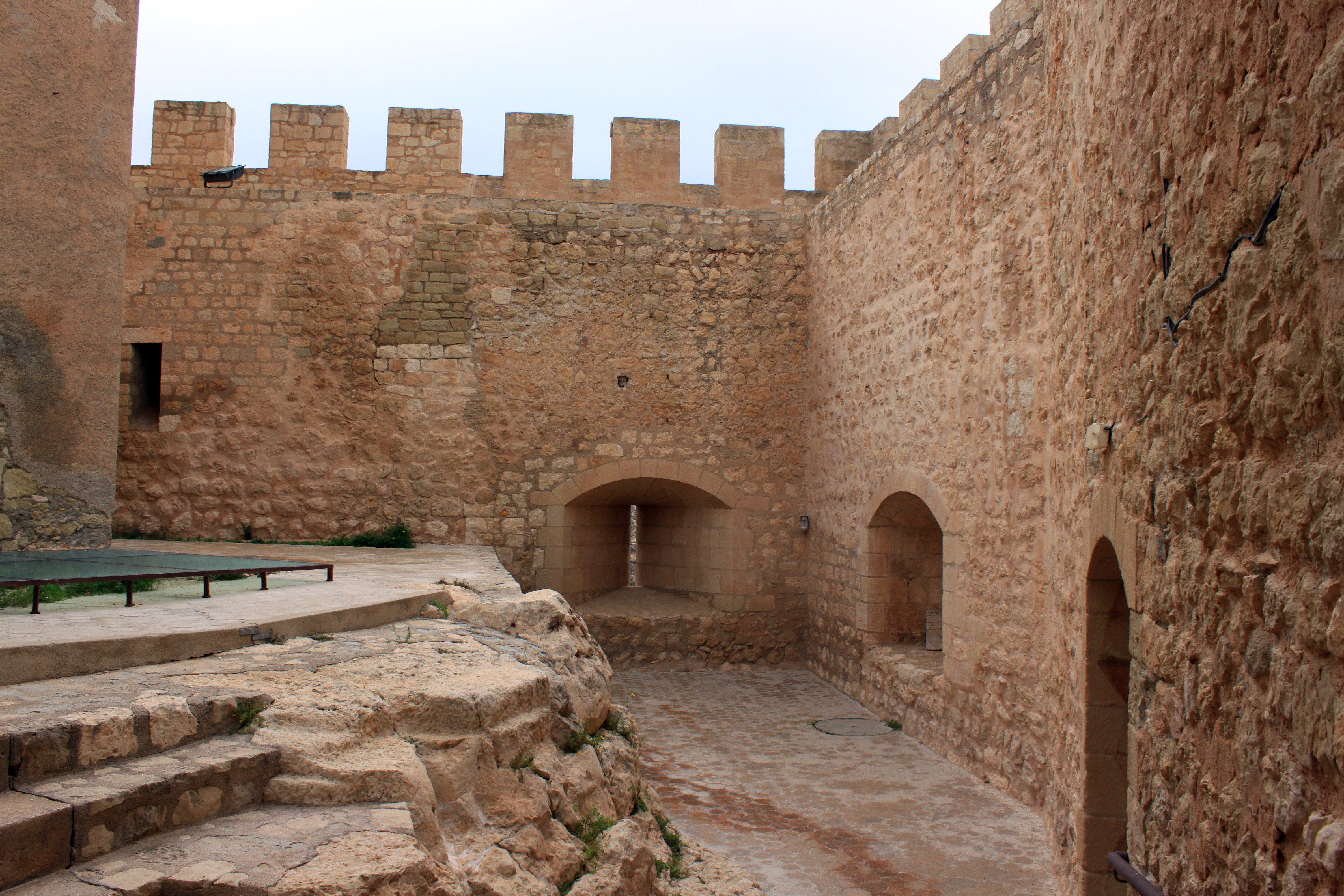 Castillo de Petrer. Vista de la entrada principal desde la capilla. Petrer, provincia de Alicante, Comunidad Valenciana, España.